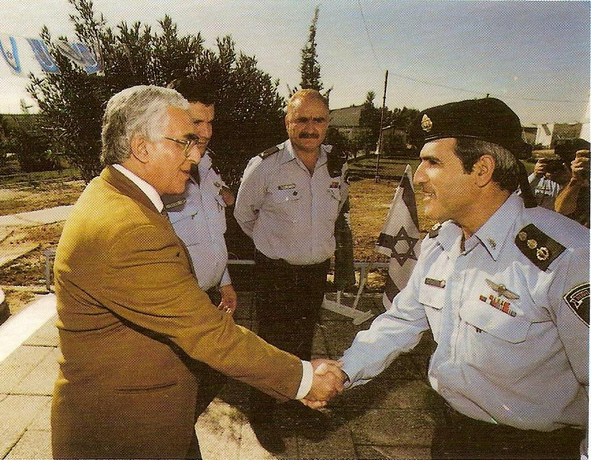 מרדכי מוטי ירושלמי, השר משה שחל